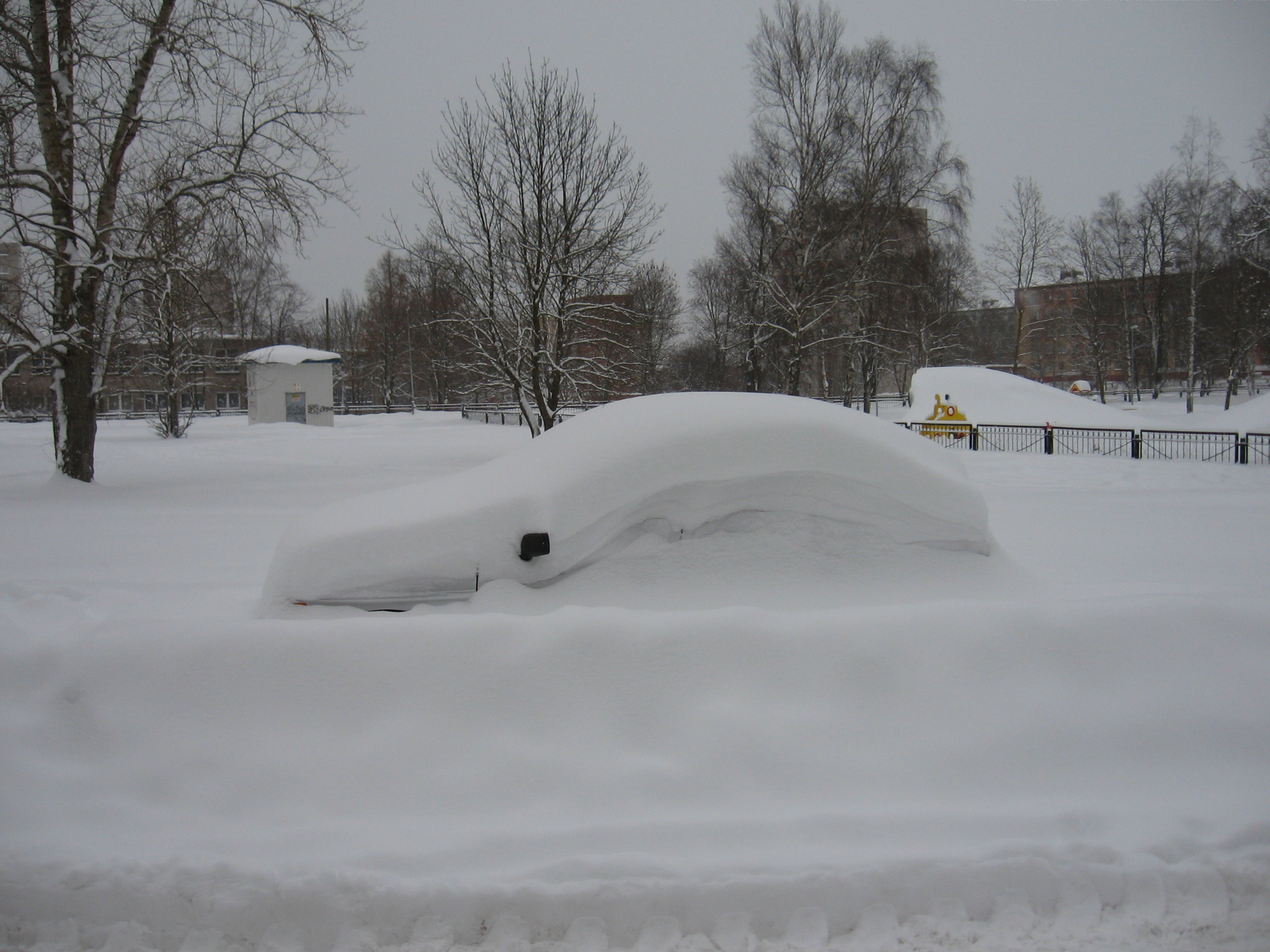 Monika lumetormi tagajärjed Narvas, Eesti